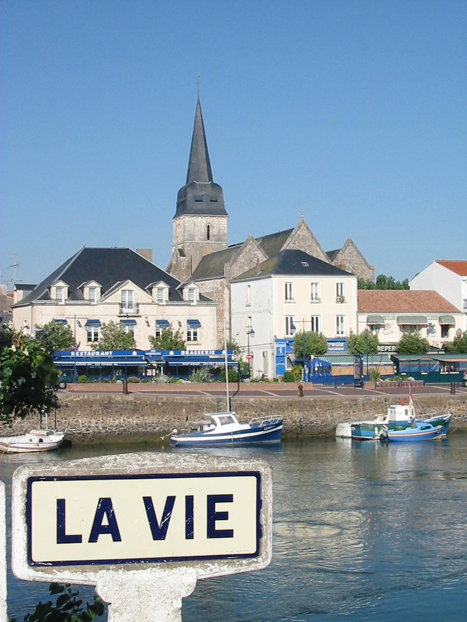 La Vie & l'église Saint-Gilles de Saint-Gilles-Croix-de-Vie en Vendée.